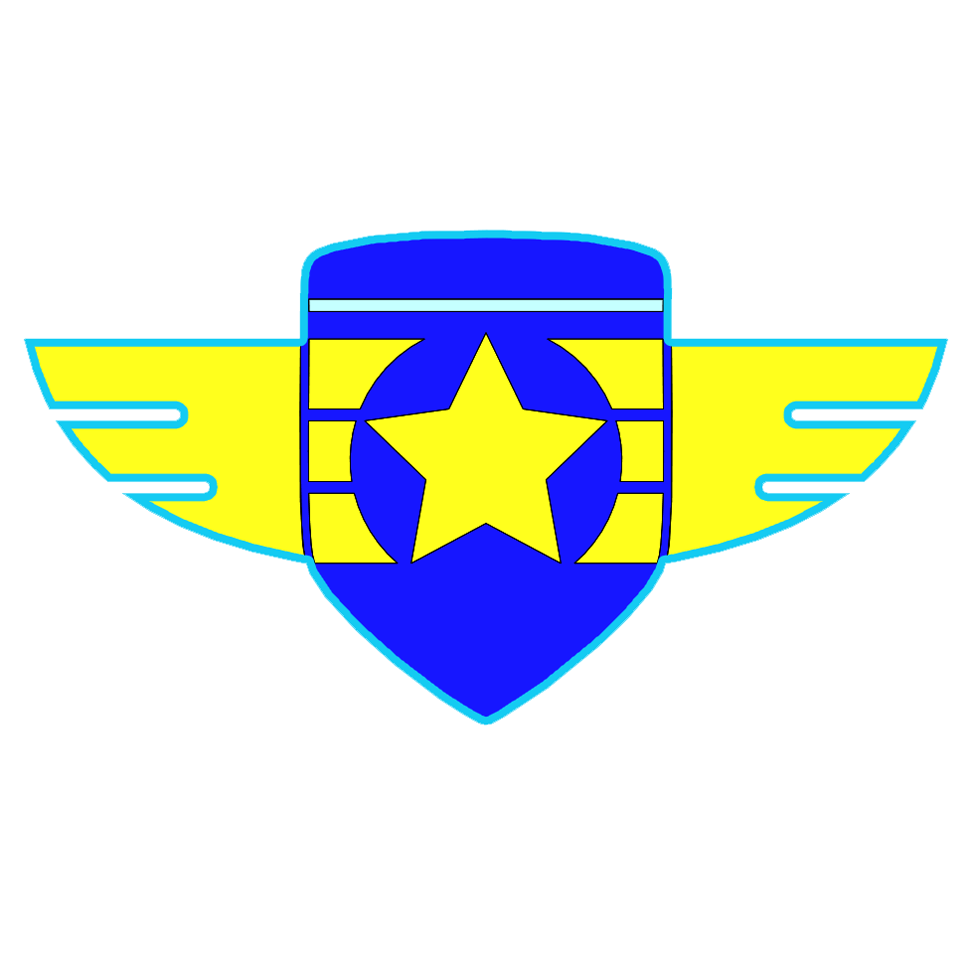 Banner der Charakterfigur Paul aus der Zeichentrickserie Super Wings.